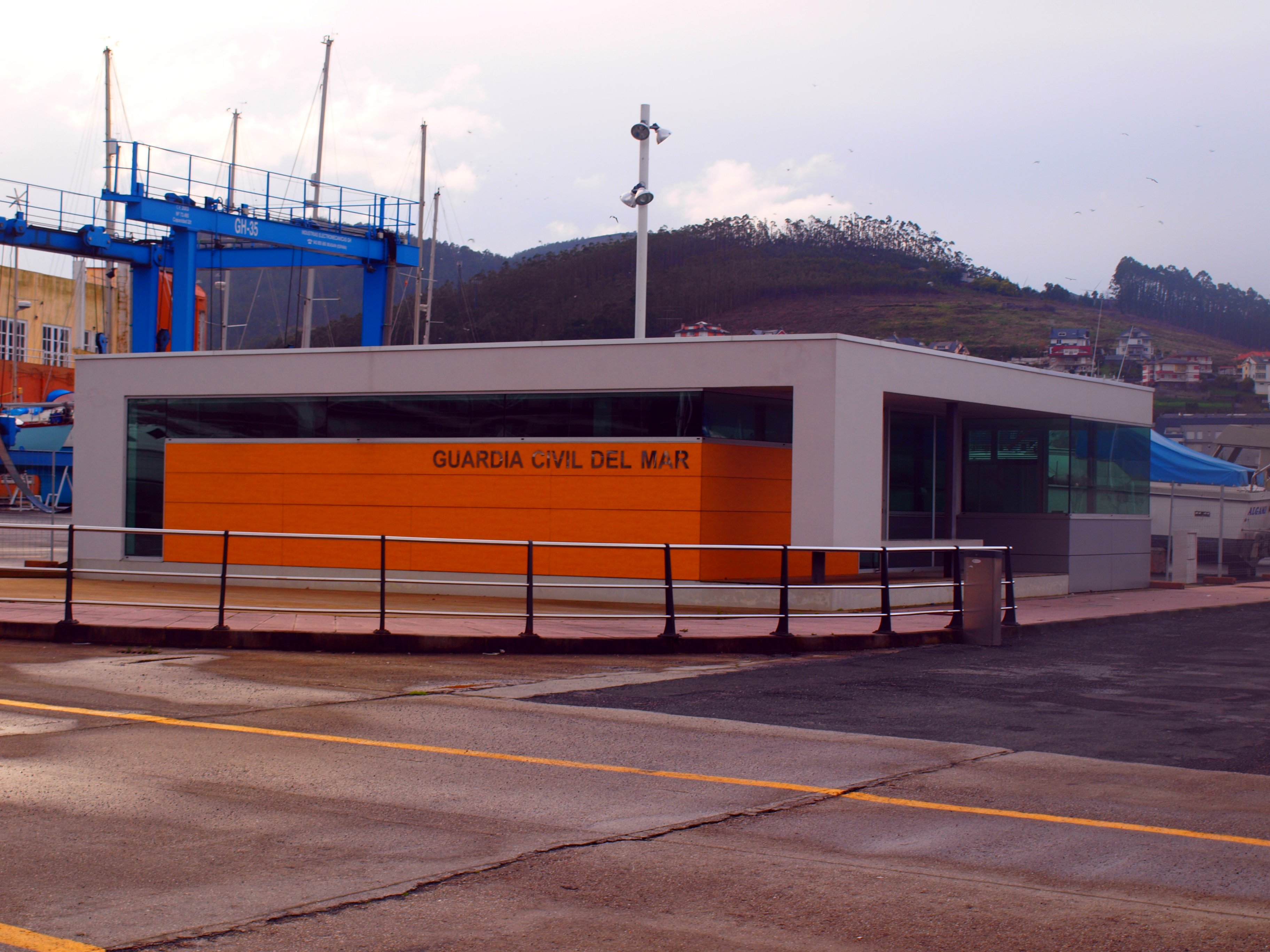 Cuartel del Servicio Marítimo de la Guardia Civil.